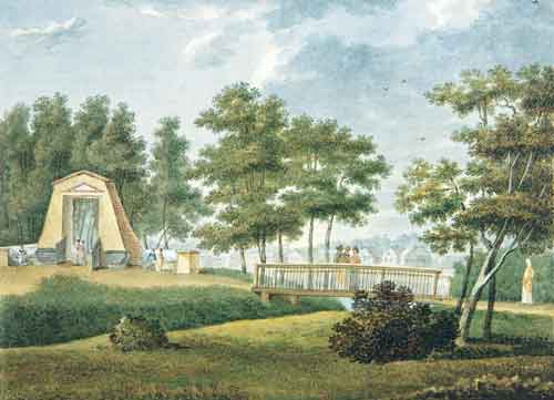 Вид на Египетские ворота в Строгановском саду. 1812. Бумага, акварель. Из альбома С. В. Строгановой